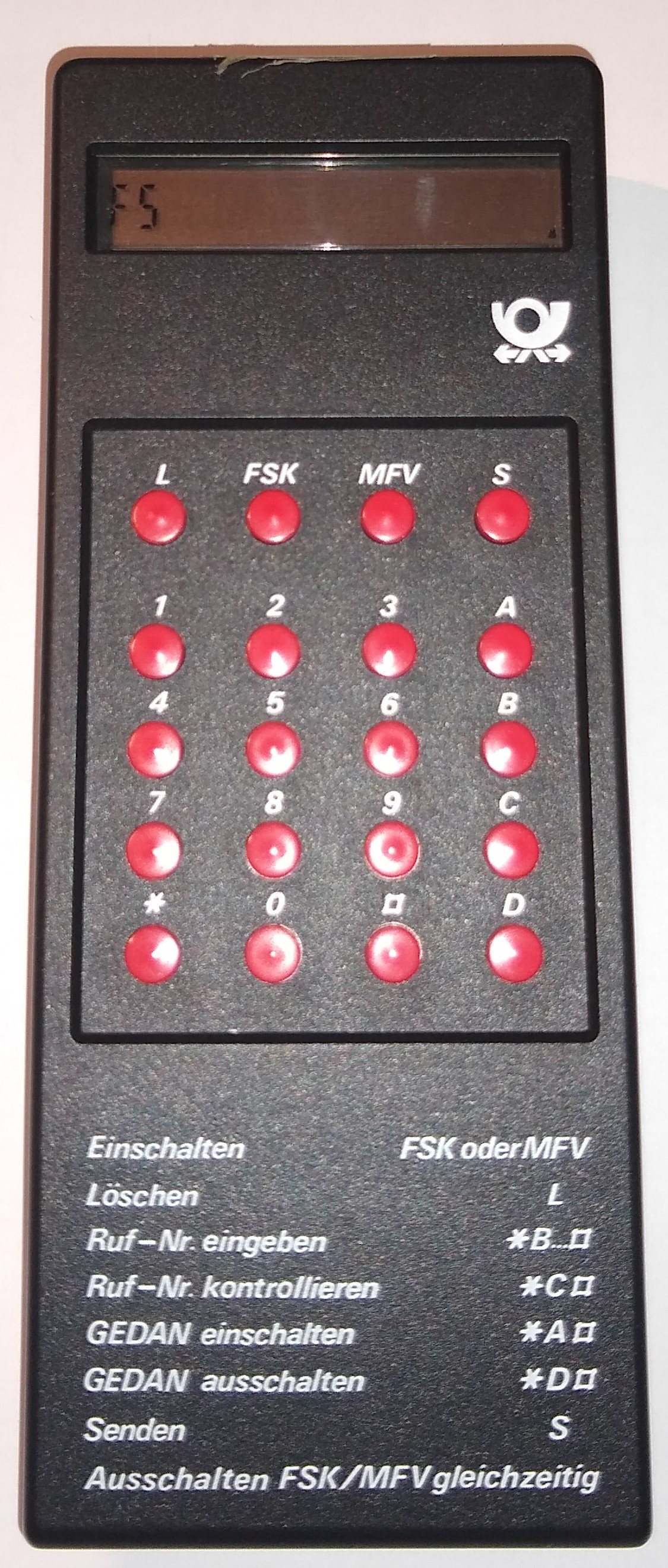 Eingeschaltetes Gerät im FSK Modus